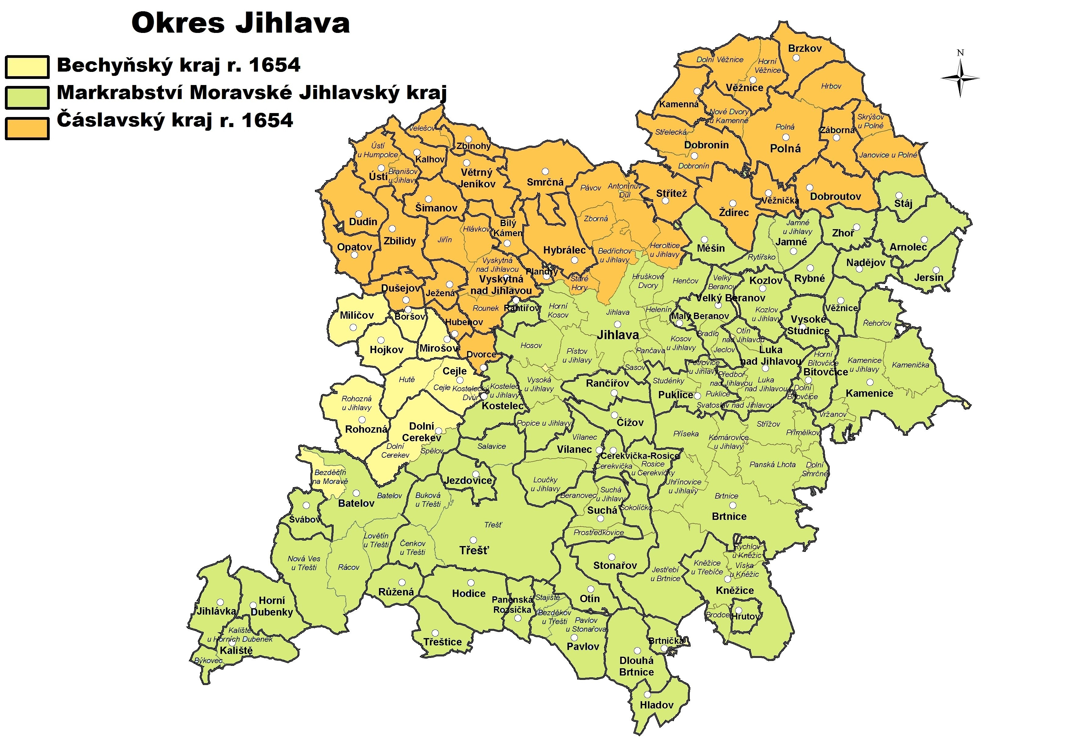 Čáslavský kraj r. 1654 v dnešním okrese Jihlava